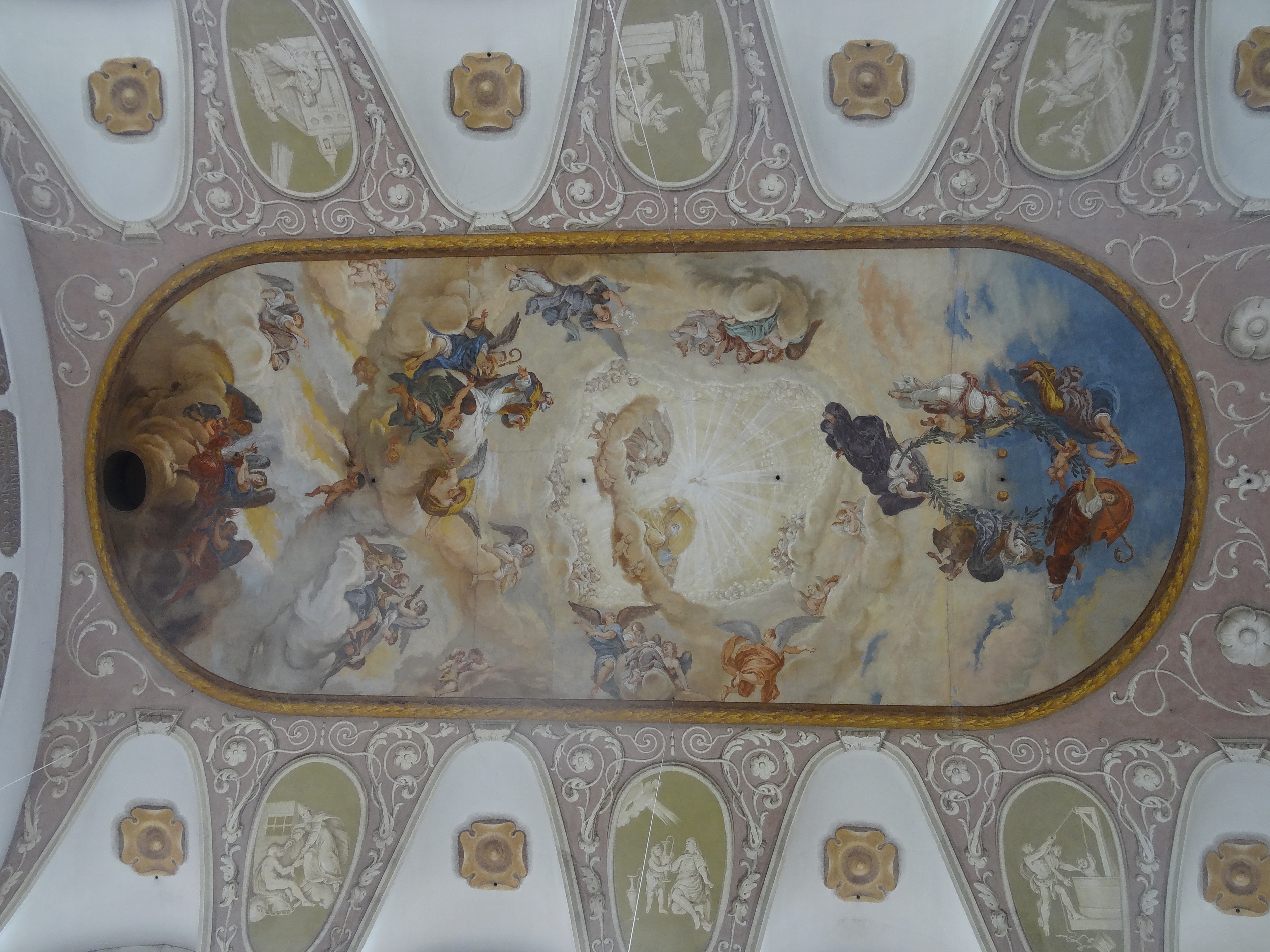 Deckenfresko im Langhaus der Pfarrkirche St. Nikolaus in Altfraunhofen (Lkr. Landshut)